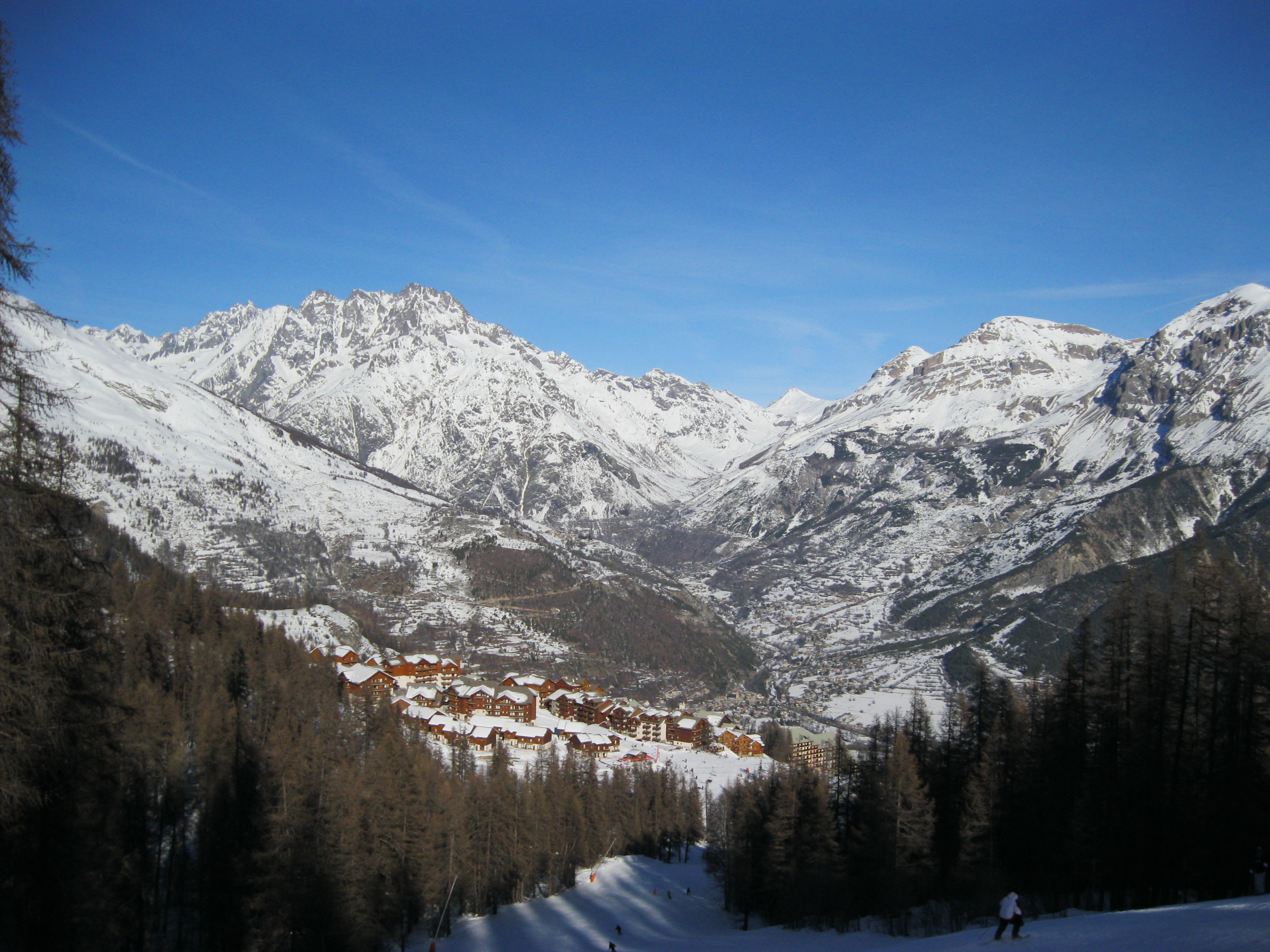 Vue sur la station du Puy-Saint-Vincent (1800m)